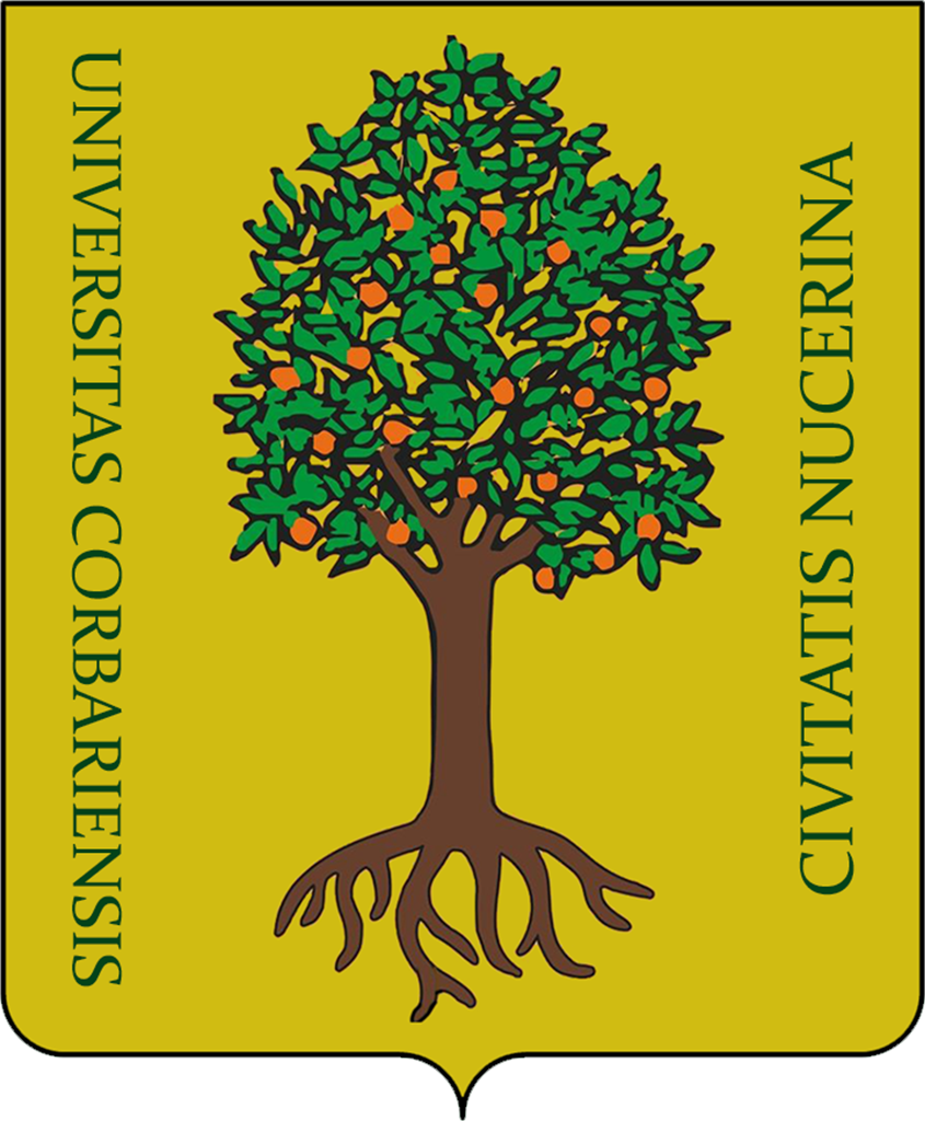 Riadattazione dello stemma dell'antica università di Corbara, realizzato seguendo le ricerche storiche usate anche dalle associazioni rievocative del territorio. La riproduzione è approssimata ed ha un puro fine informativo e didattico.